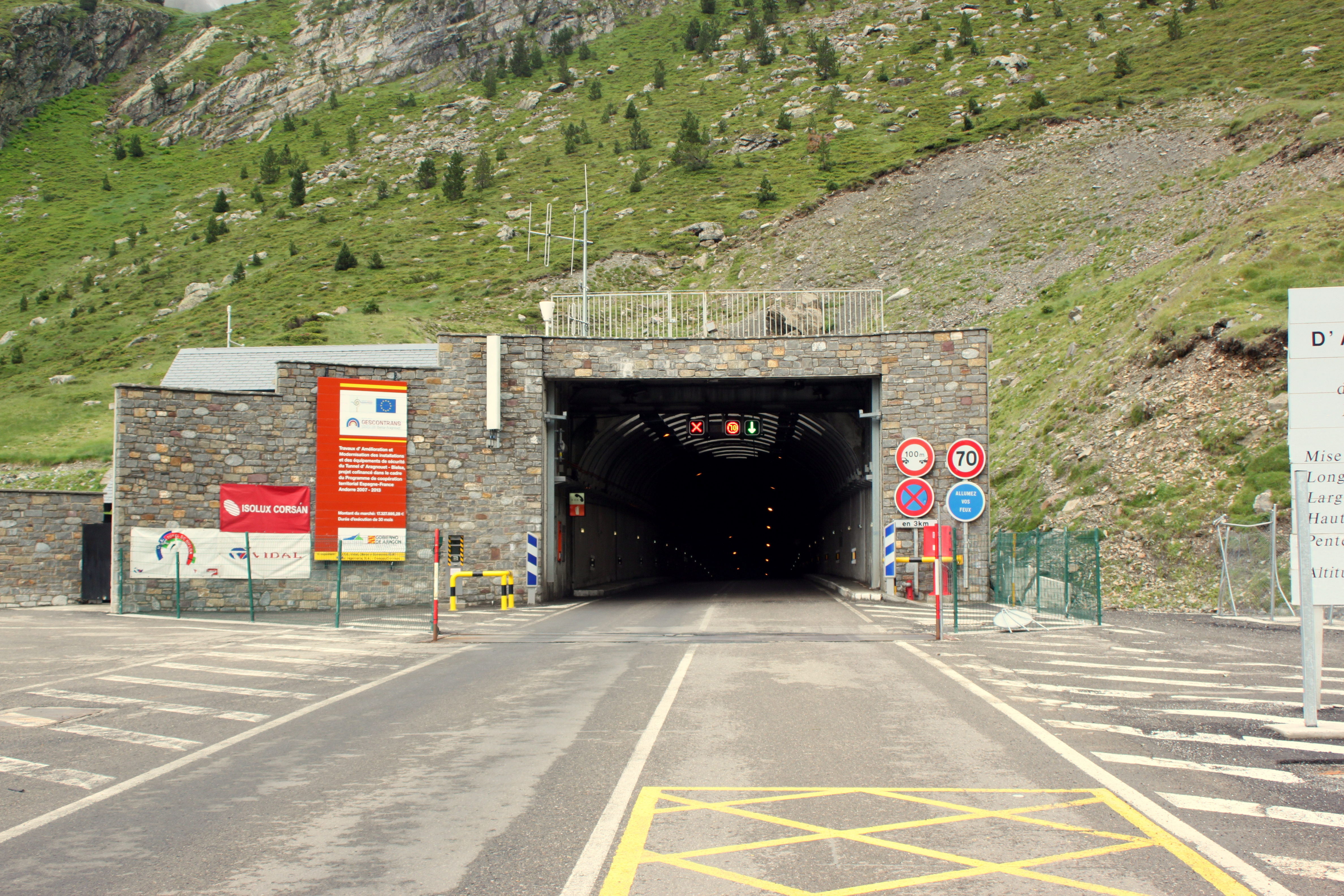 Entrée française du tunnel de Bielsa, Fr-65-Aragnouet.